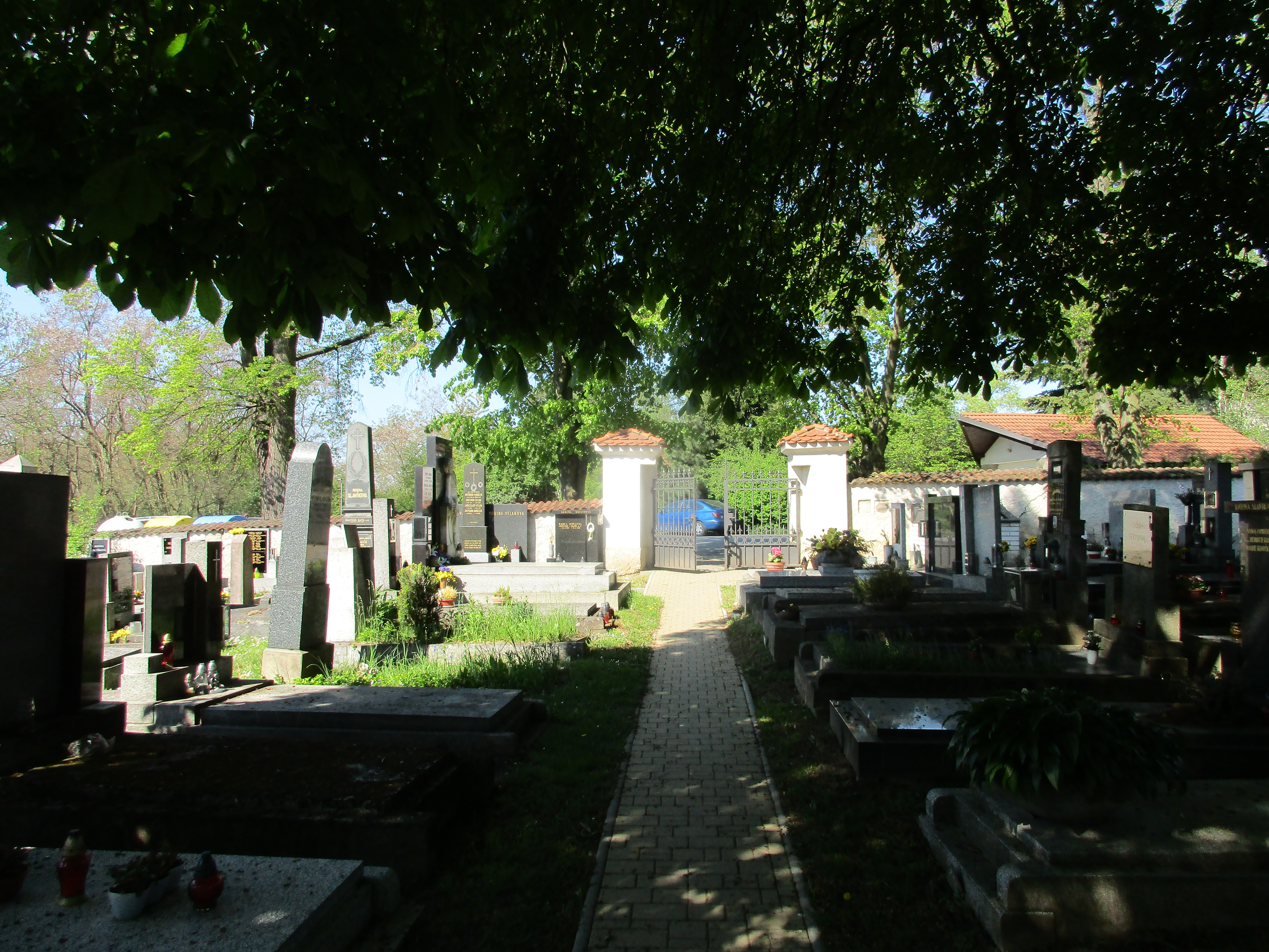 Hřbitov ve Slivenci.